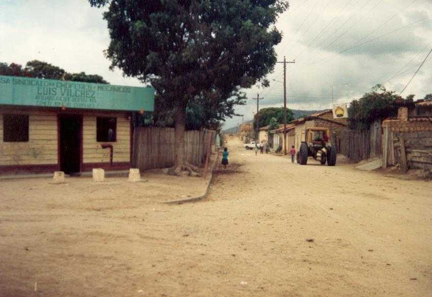 Ocotal Nicaragua América Central (1988).